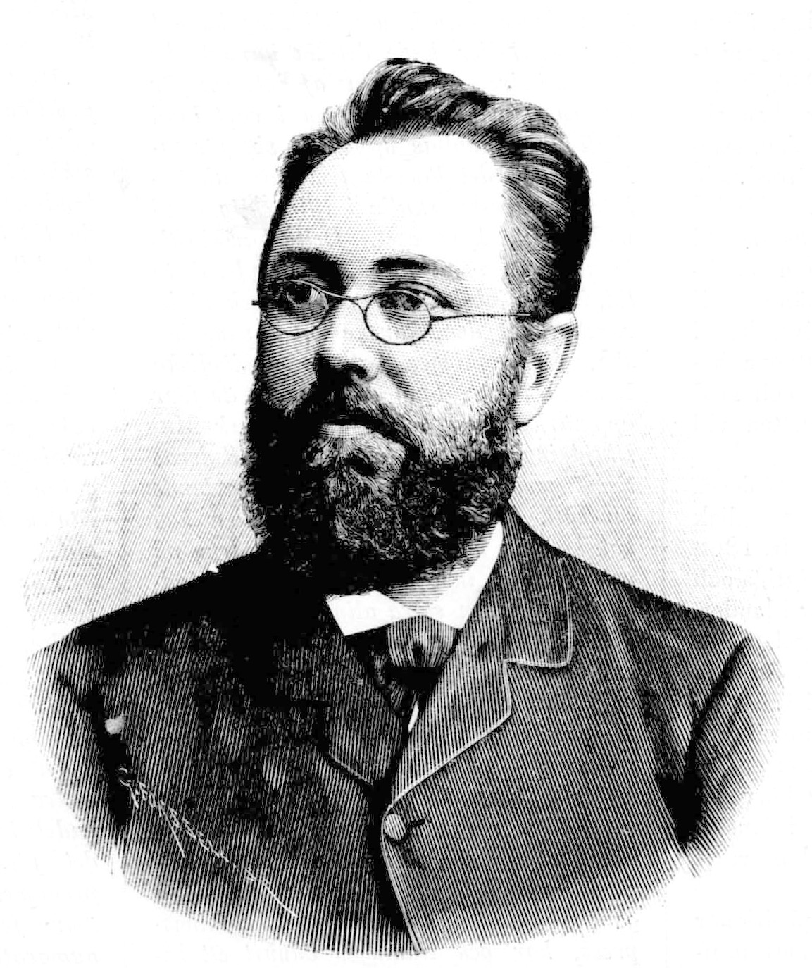 Wilhelm Heintze (1849-1895)